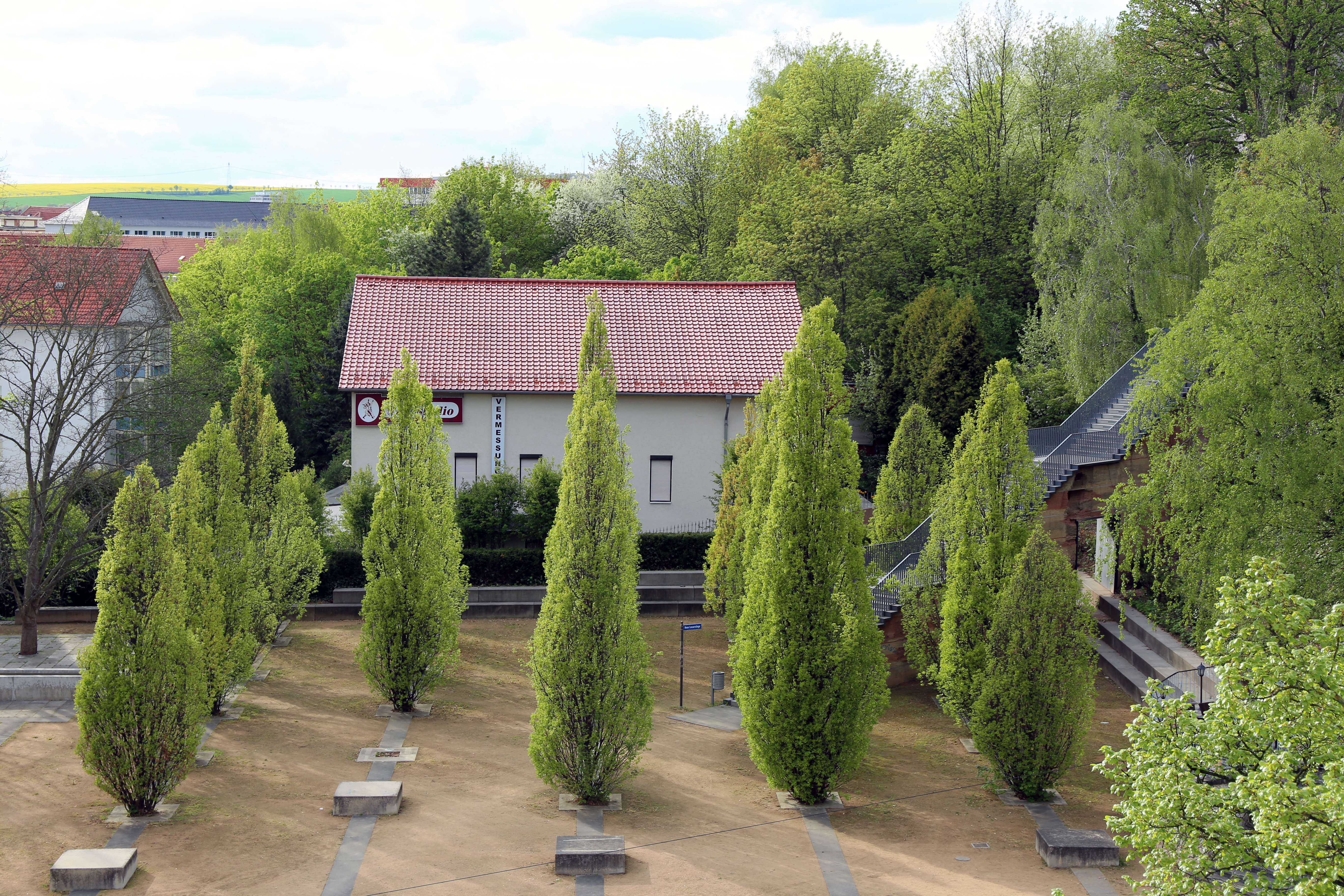 Rautenstraße Nordhausen, einstiger Standort der St. Jacobikirche. Verdeckt die Neue Lesserstiege.